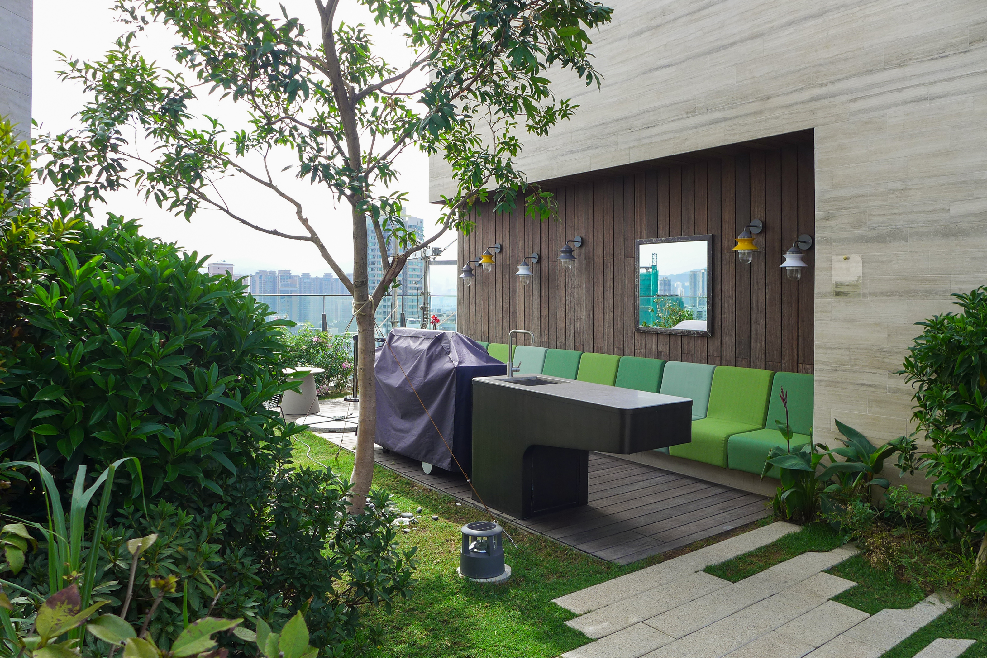 SKYPARK Rooftop garden